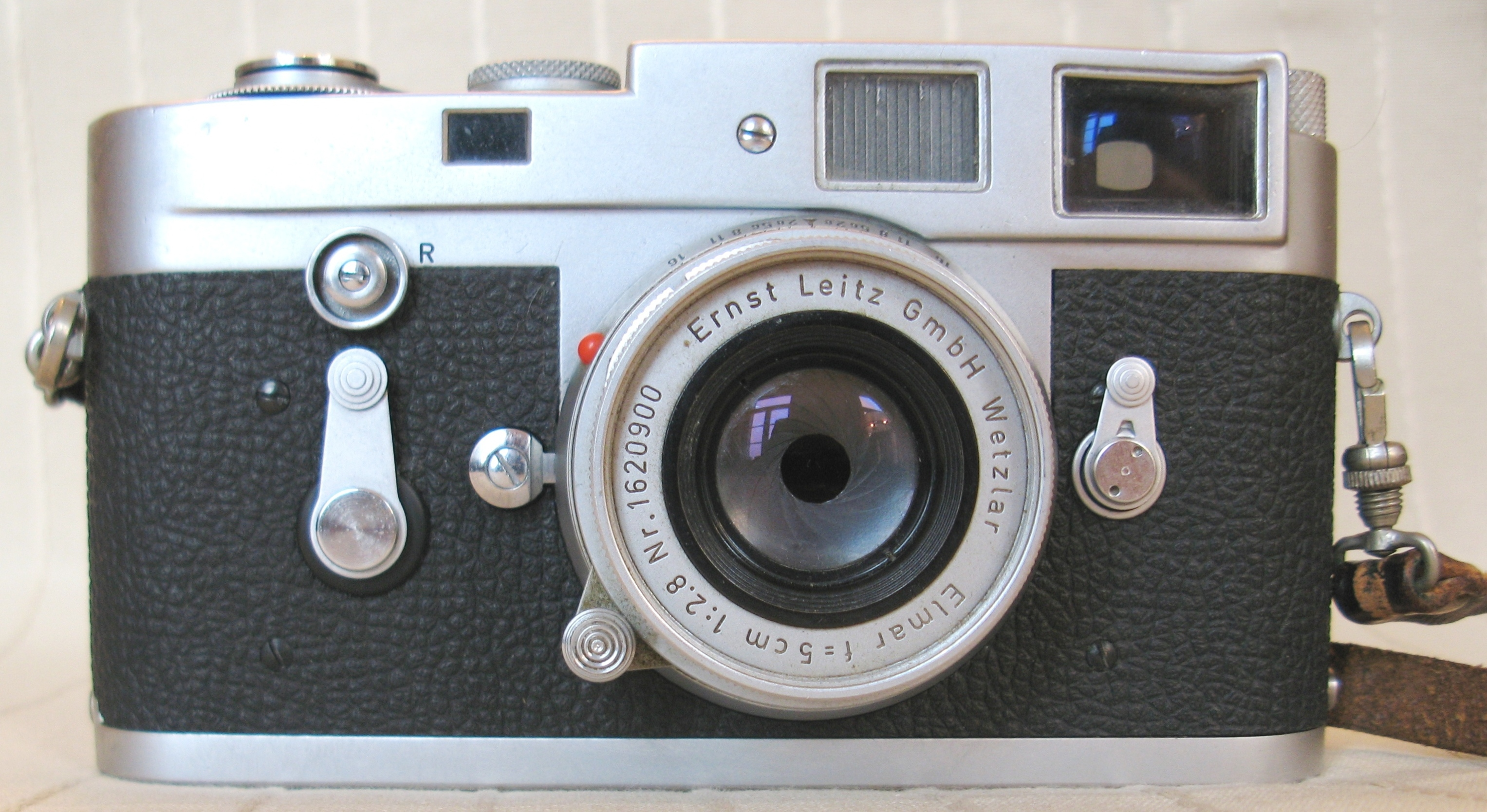 Eng Leica M2 vu vir gesinn.